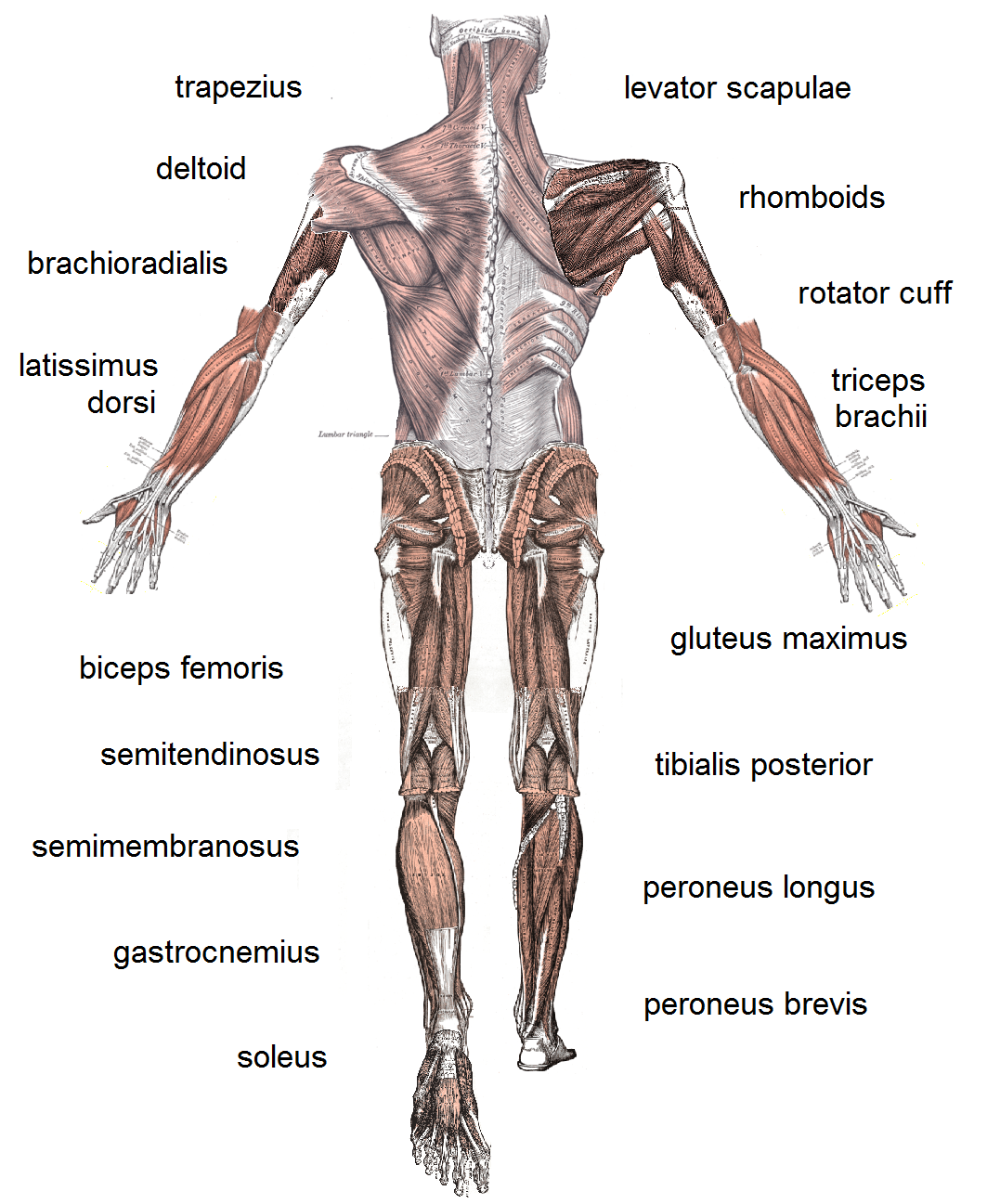 Collage of several of Gray's muscle pictures, by Mikael Häggström (User:Mikael Häggström)